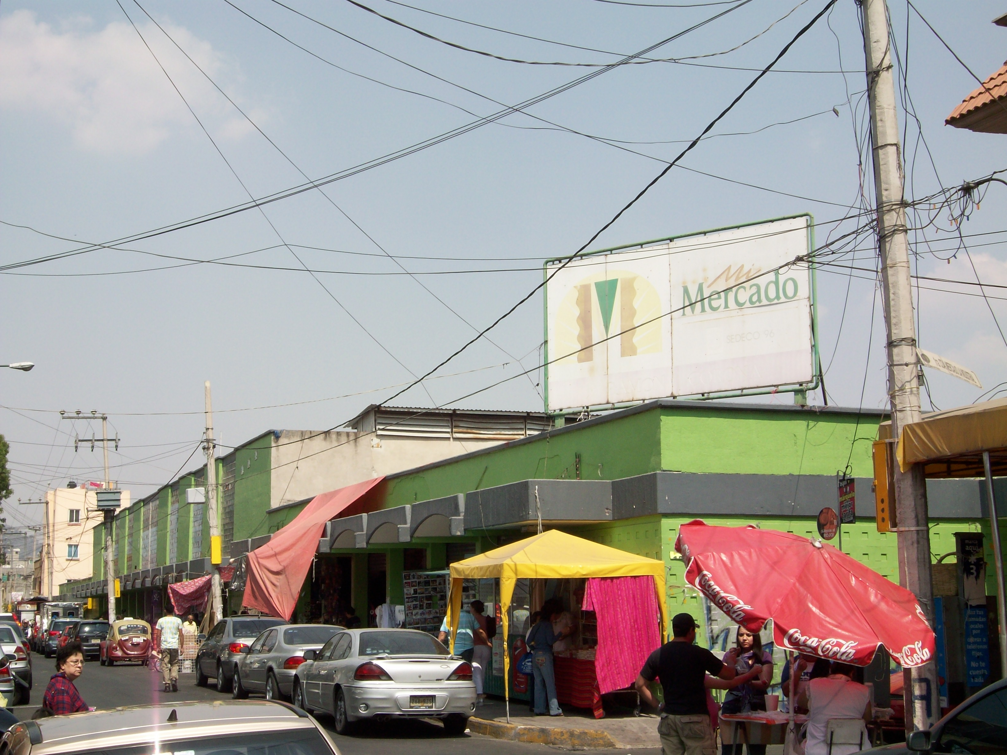 Mercado de la colonis Industrial